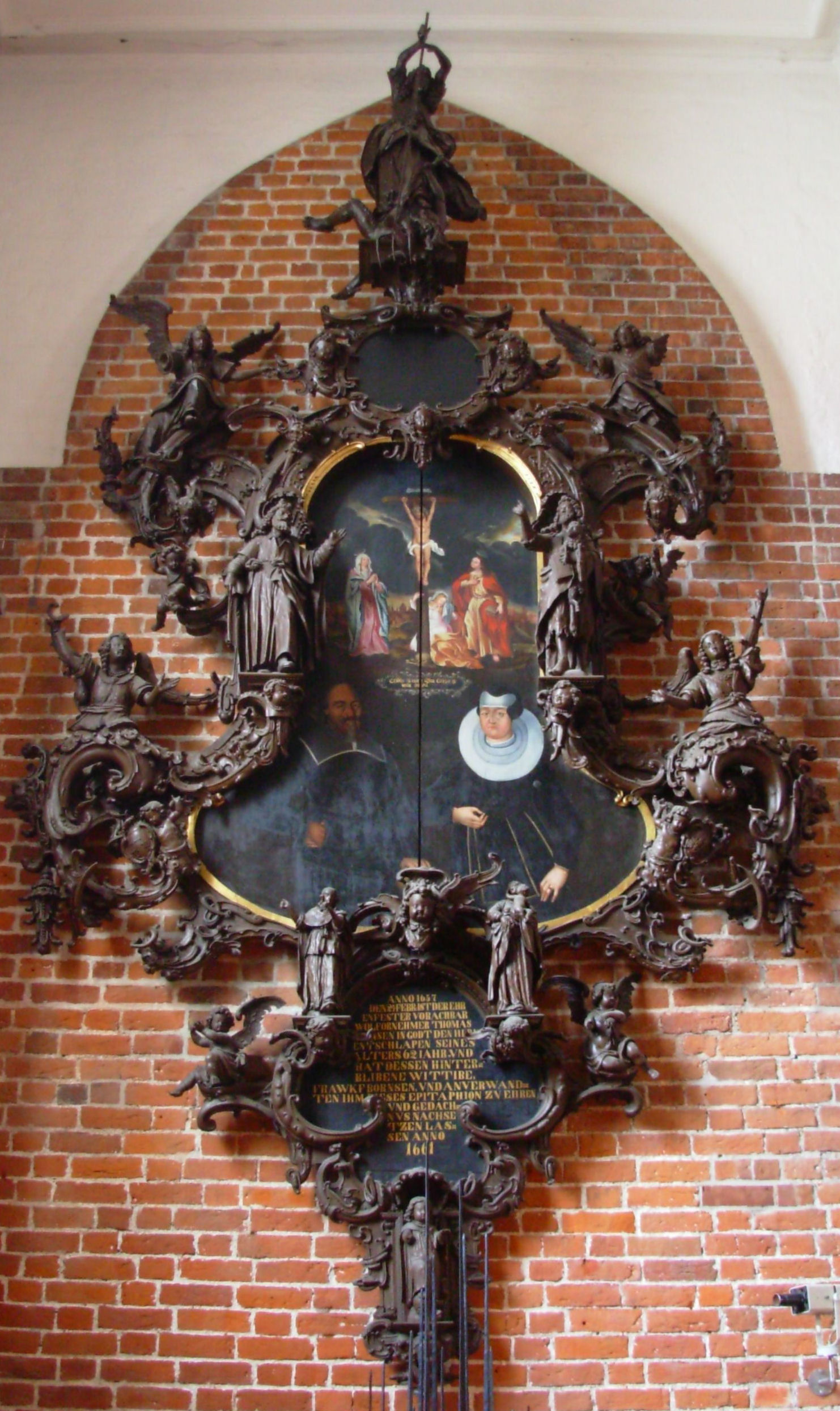 Epitaph für Thomas Börnsen in der St. Nikolai-Kirche Eckernförde